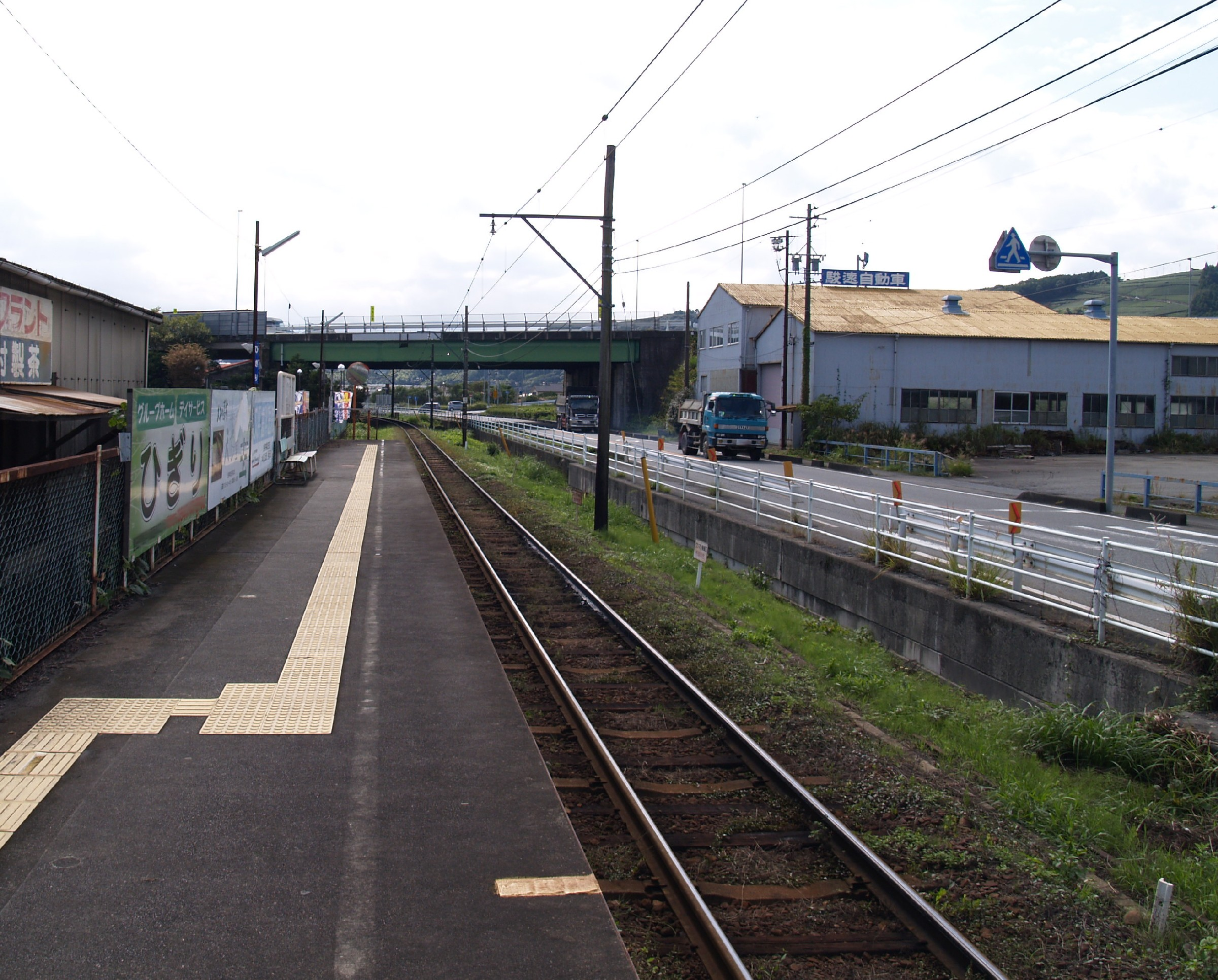 日切駅